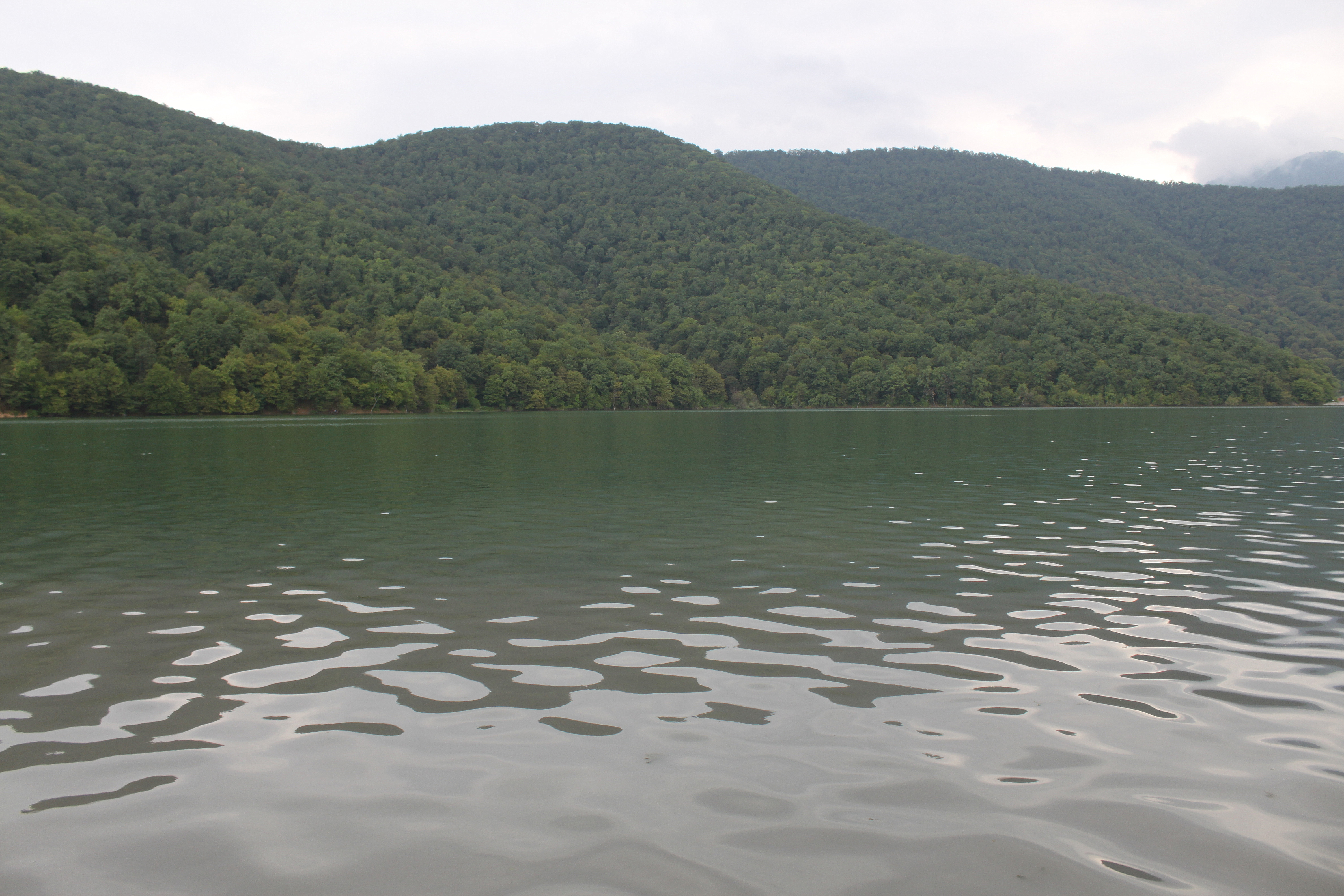 Габалинский район Азербайджана